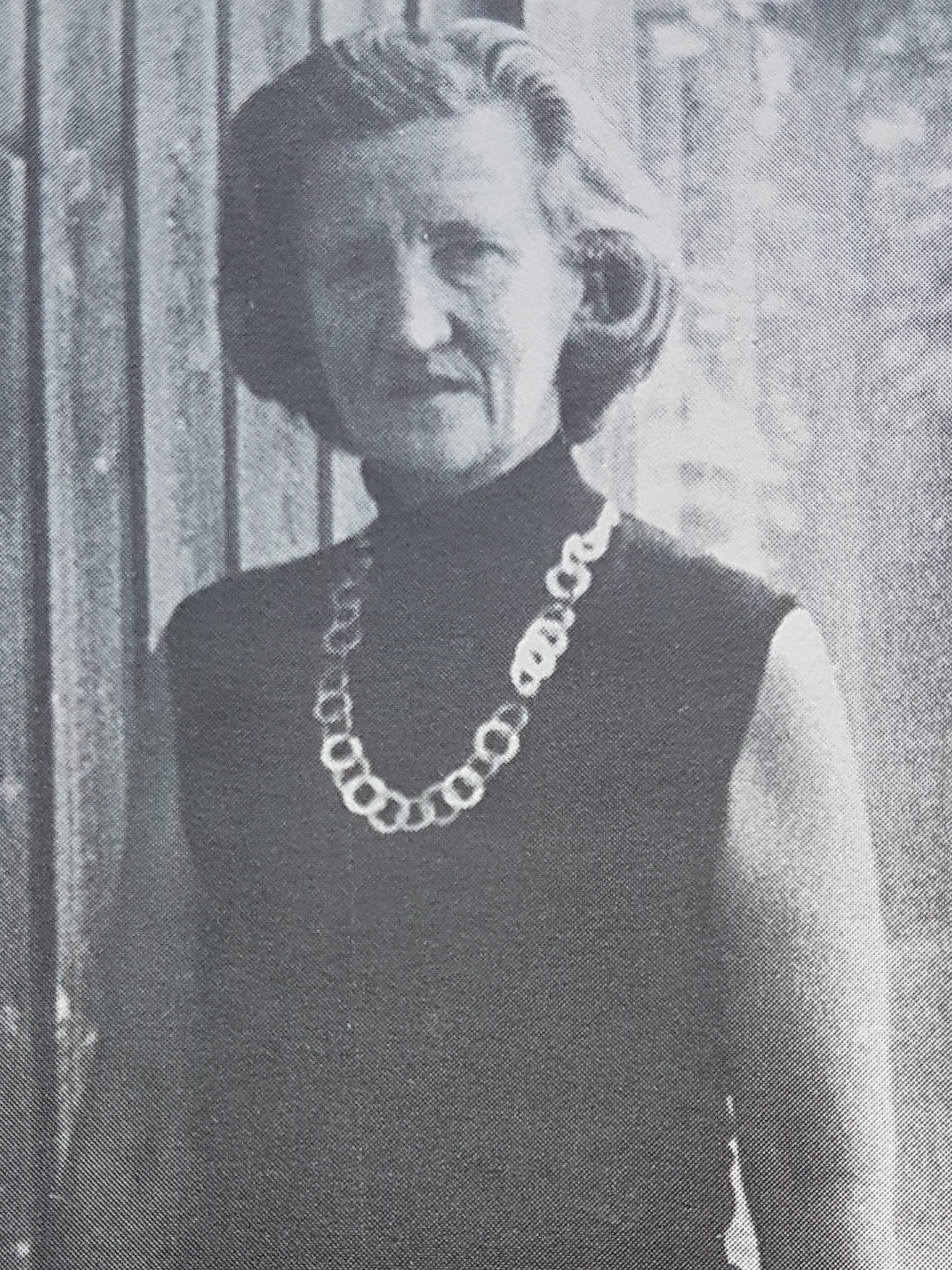 Karin Ander Artist from Sweden